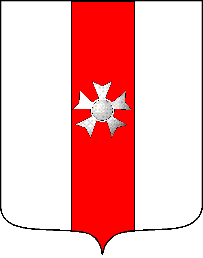 chevalier Legion d`Honneur